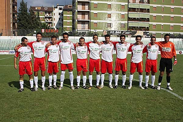 Rende Calcio 2008-2009 (Rende vs Luzzese)